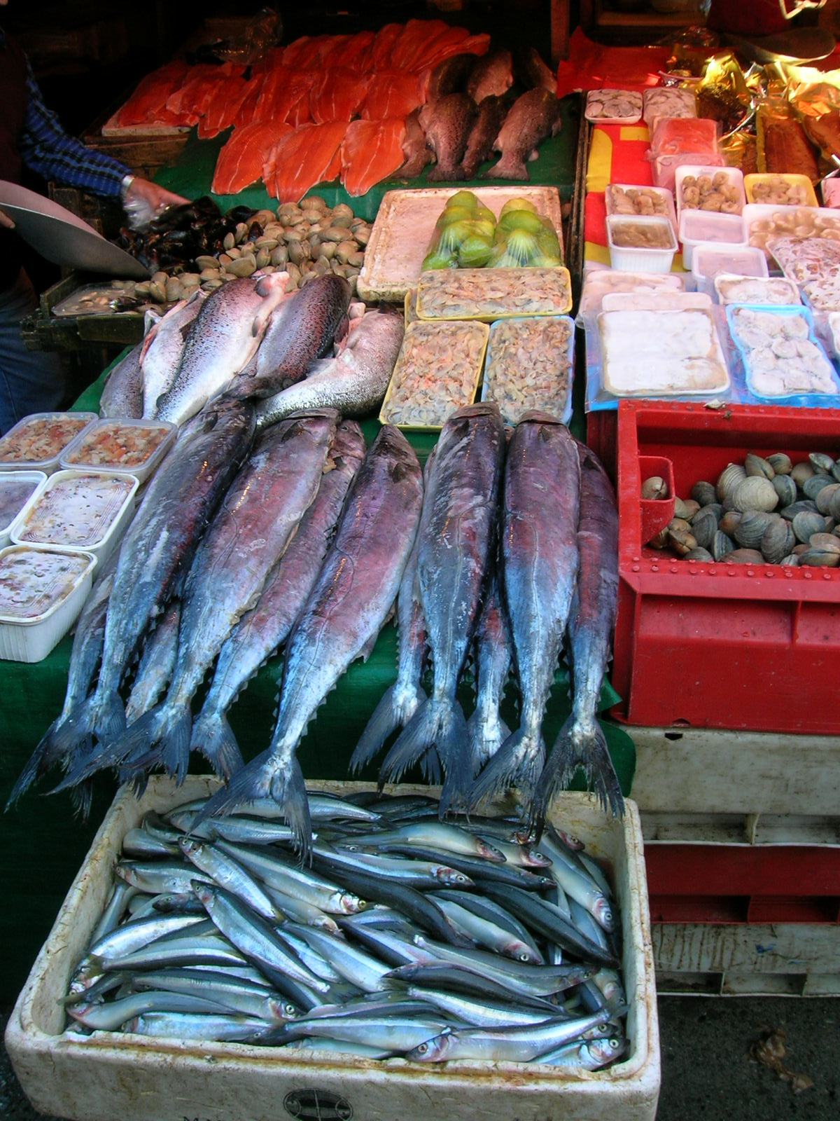 Peces en Caleta Angelmó, Puerto Montt - Chile